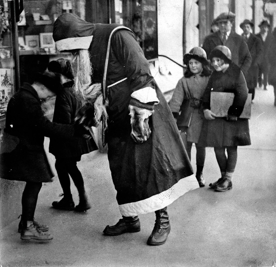 Joulupukki Helsingin kaduilla joulukuussa 1930. Kuva julkaistu 14.12.1930.